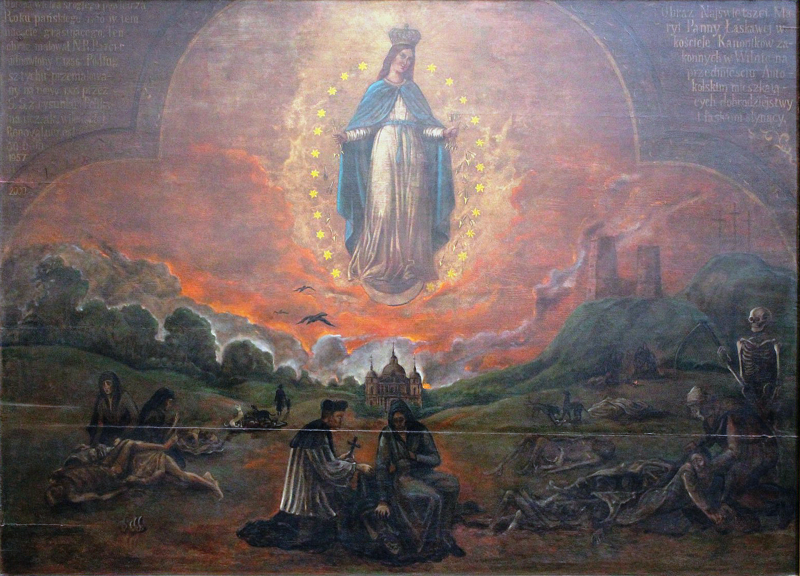 Беларуская (тарашкевіца): Вільня (Vilnia). Мор